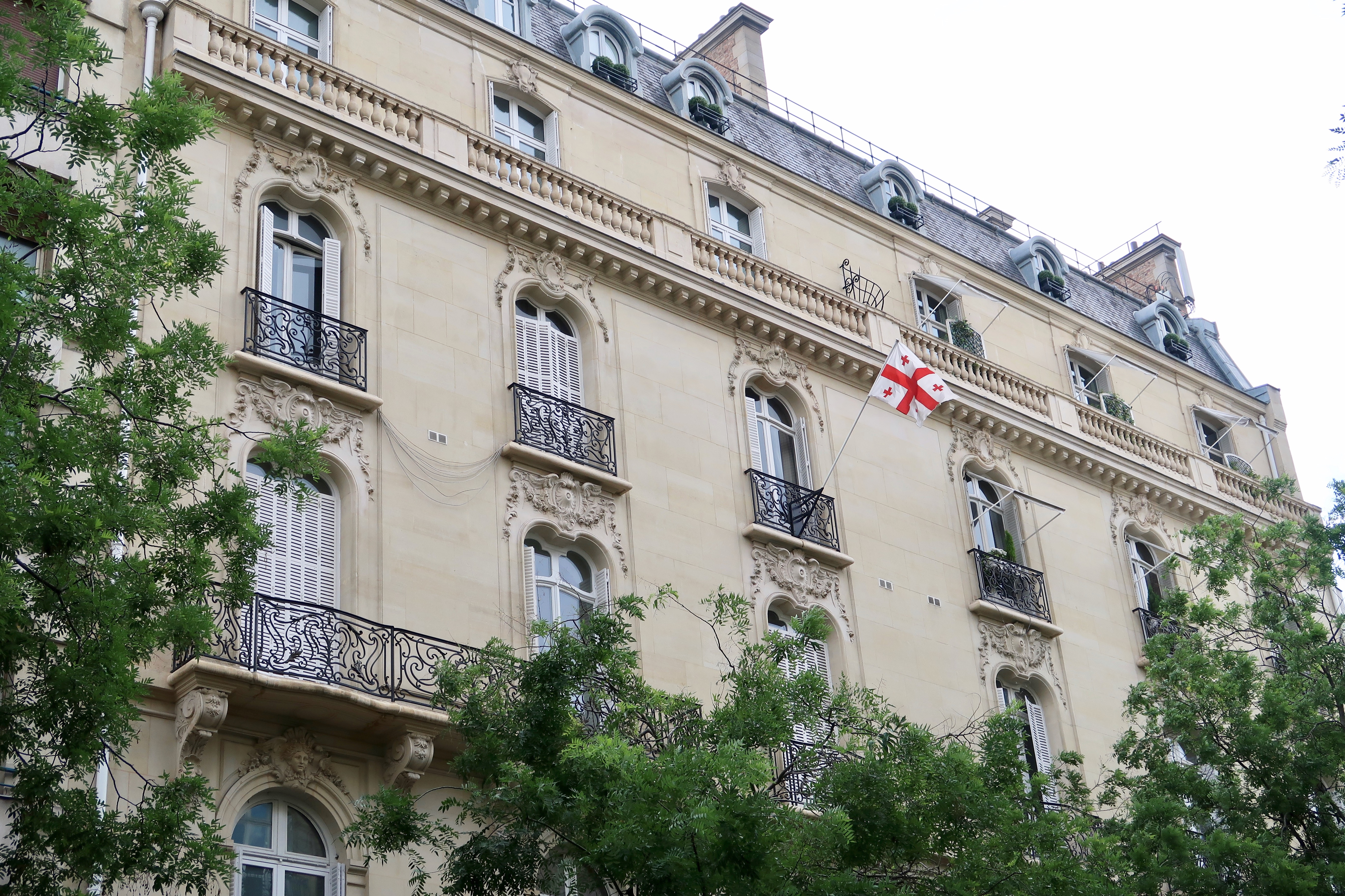 Ambassade de Géorgie en France, 104 avenue Raymond-Poincaré (Paris, 16e).